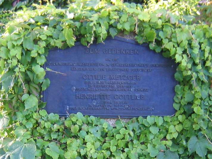 Gedenktafel für Ottilie Metzger und Henriette Gottlieb im Ferstspielpark Bayreuth